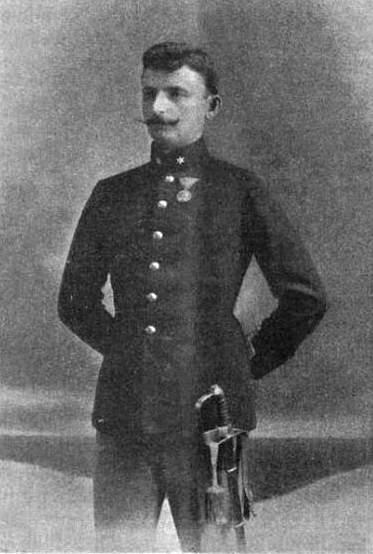 Heinrich Kipper war k.u.k-Offizier im 1. Weltkrieg.